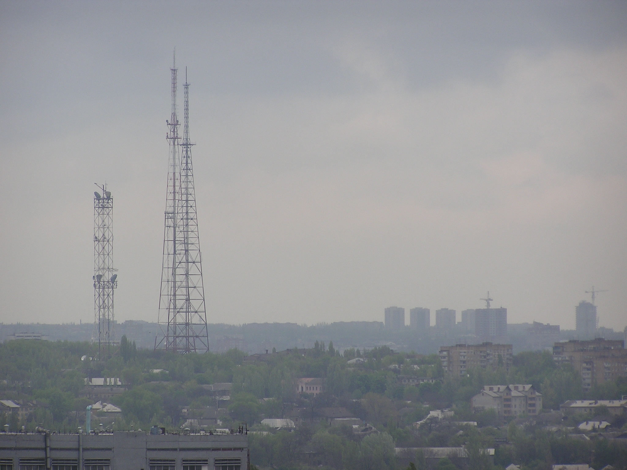 Донецкий телецентр